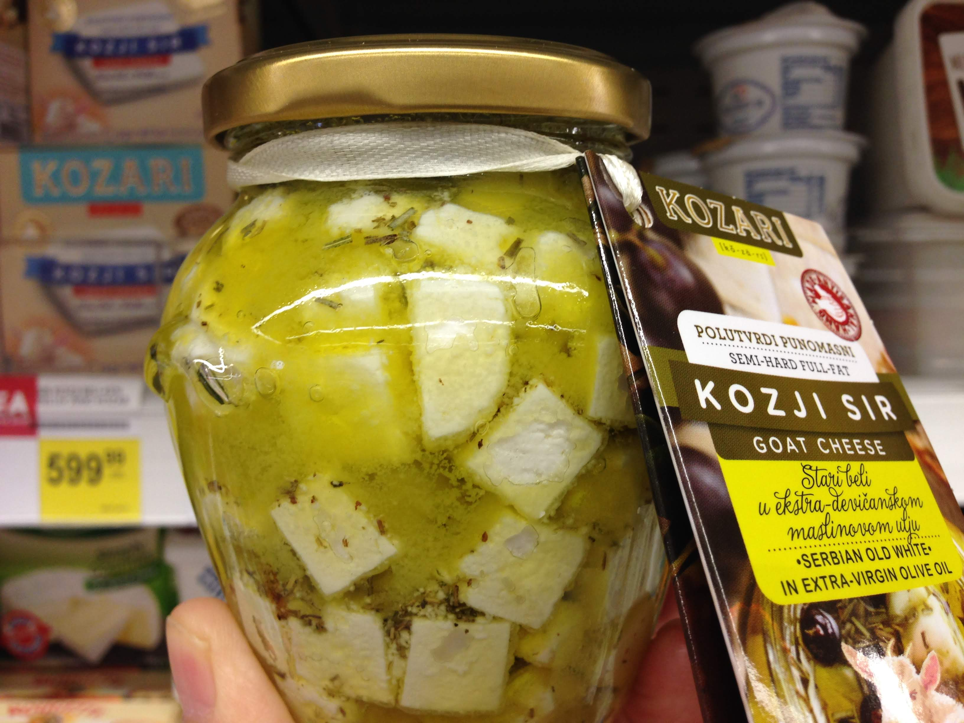 Kozji sir iz maslinovog ulja. Srpski specijalitet.